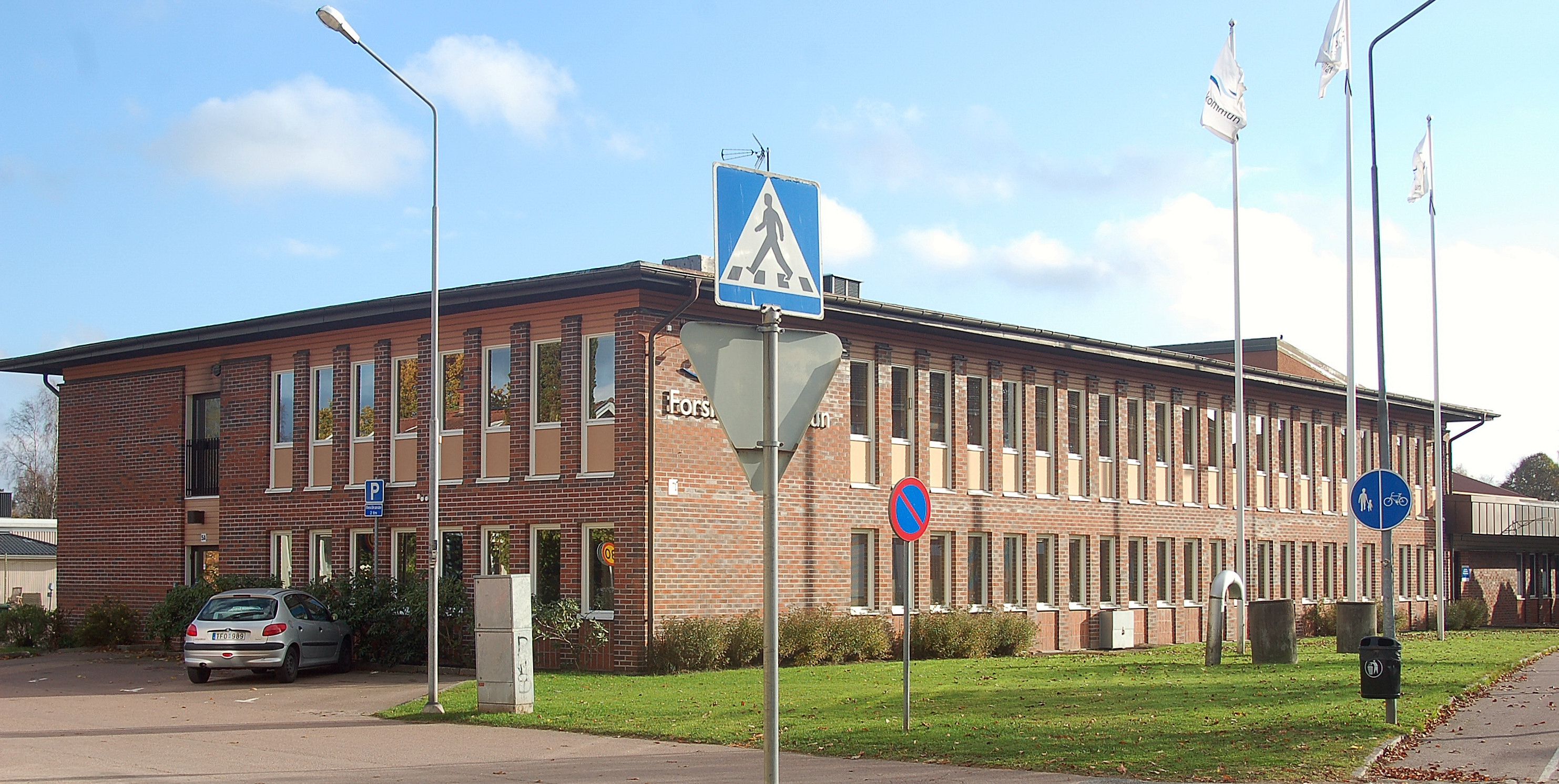 Forshaga Kommunalkontor